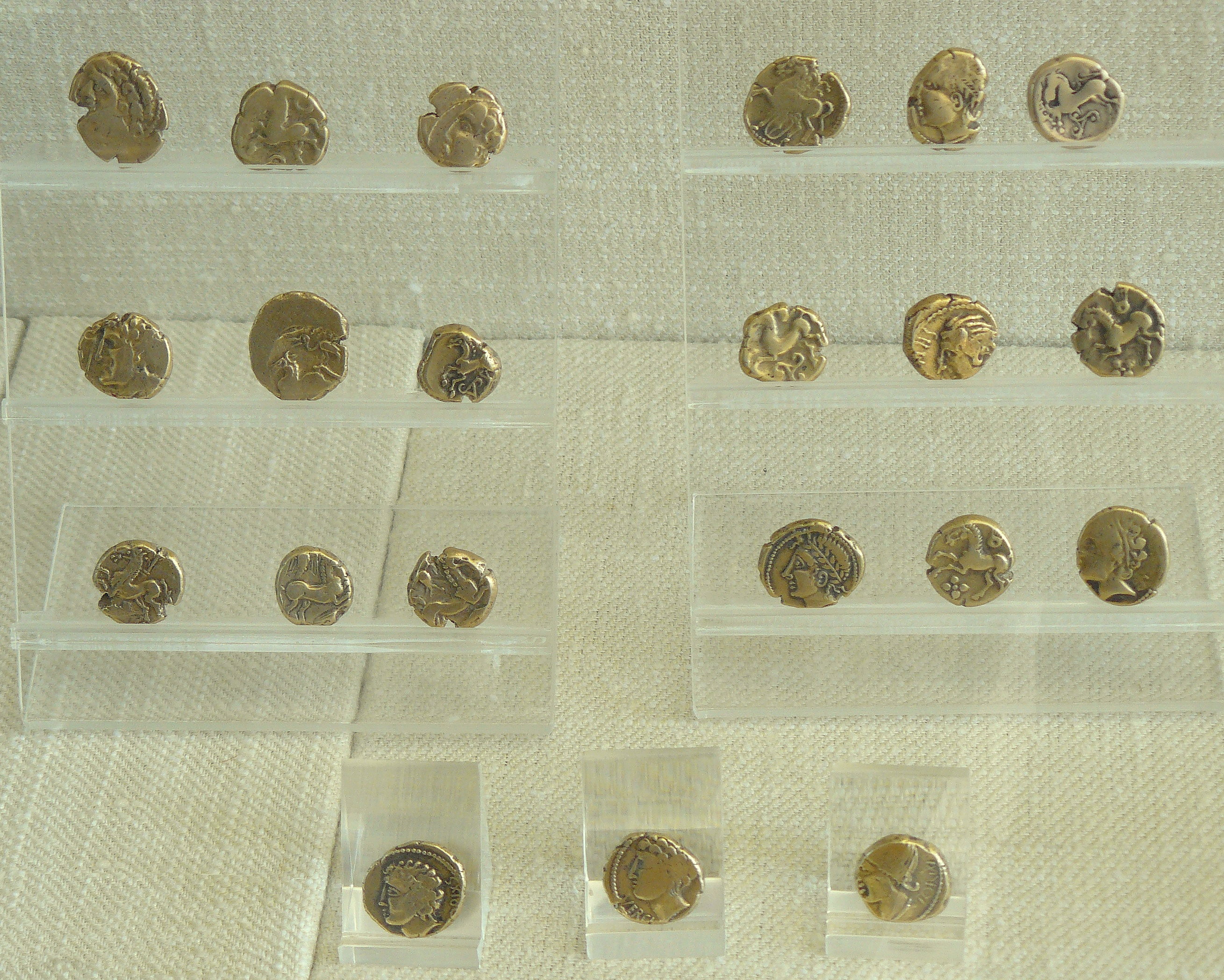 21 statères d'or ou d'électrum des Arverni (Ier siècle av.J-C.) faisant partie du Trésor de Pionsat découvert en 1853 - Certains statères à l'effigie de Vercingétorix. Cabinet des Médailles de la B.N.F.